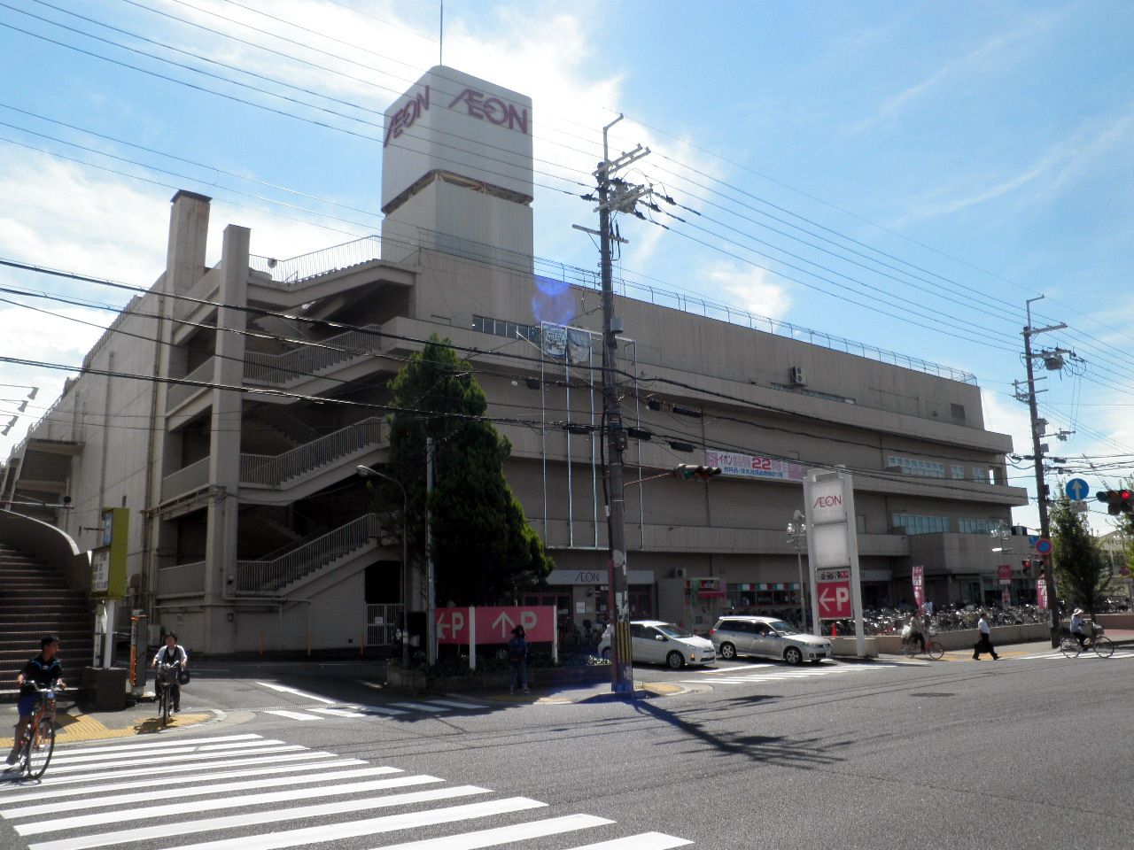 イオン大久保店（旧大久保サティ）